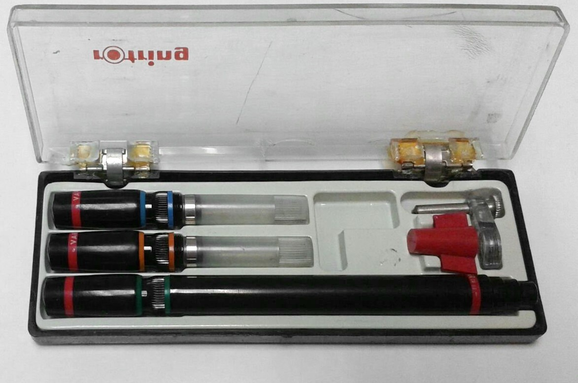 Estuche de plumas técnicas Rotring